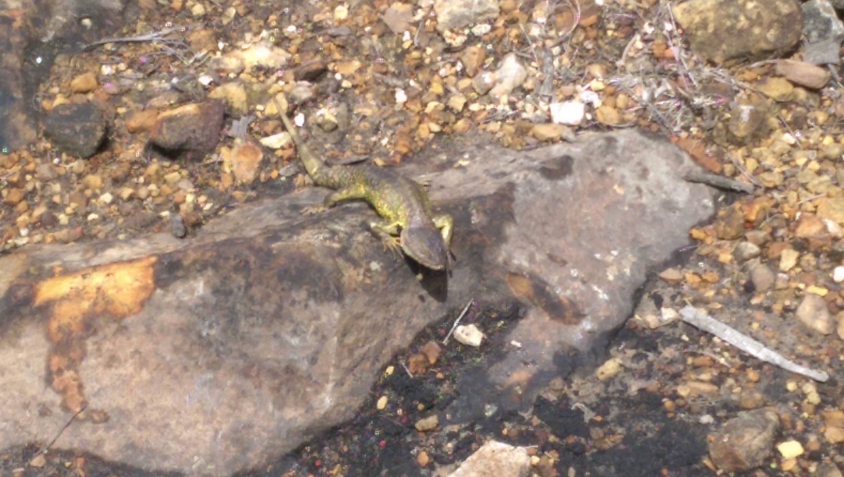 Chapinero, Bogotá, Bogota, Colombia